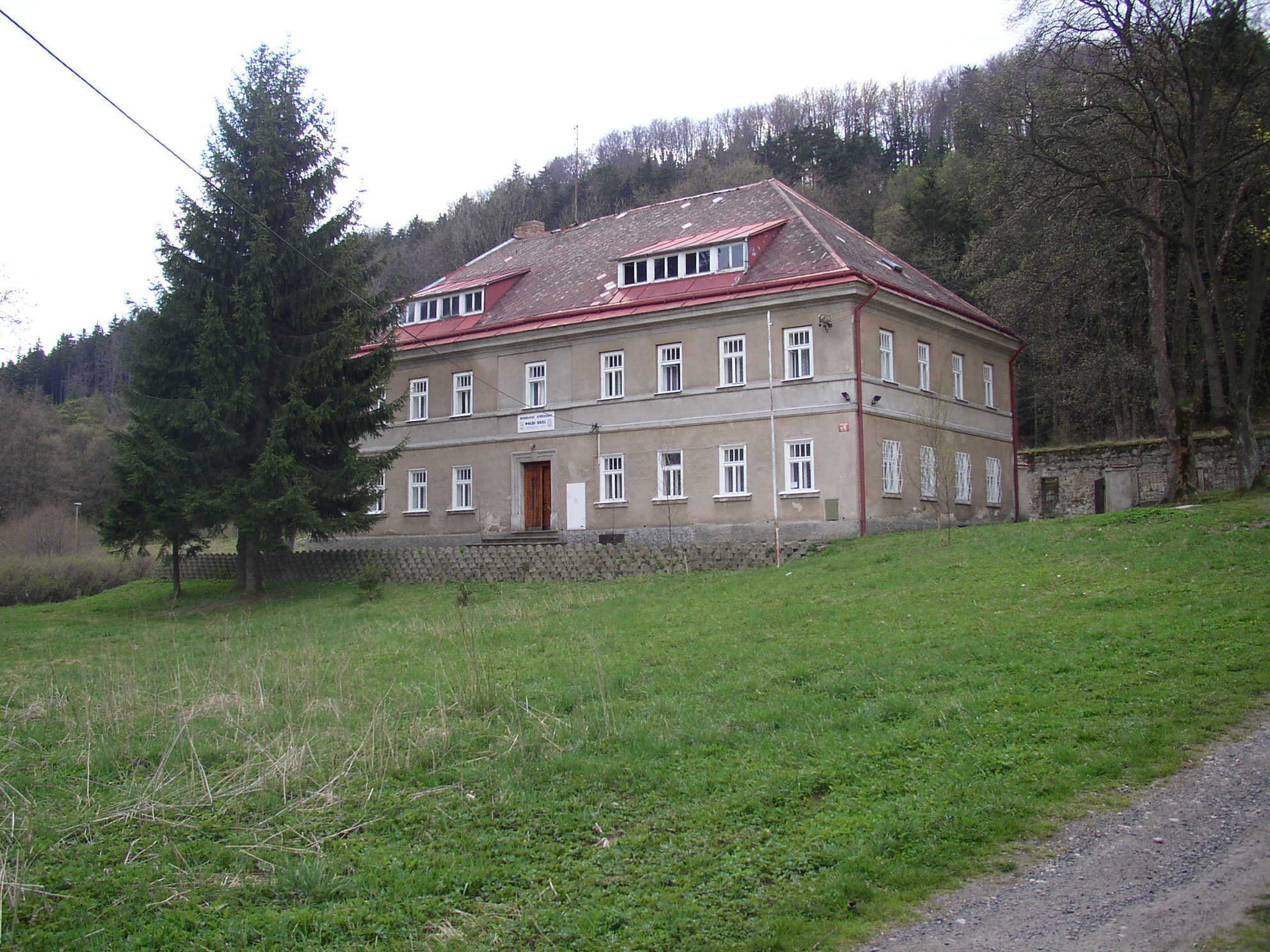 lesní mlýn, osada Lesné, Jiřetín pod Jedlovou, Česká republika